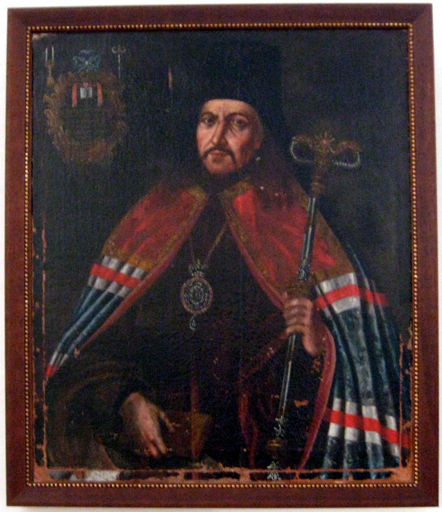 Портрет архиепископа Феоктиста. Кирилло-Белозерский монастырь.